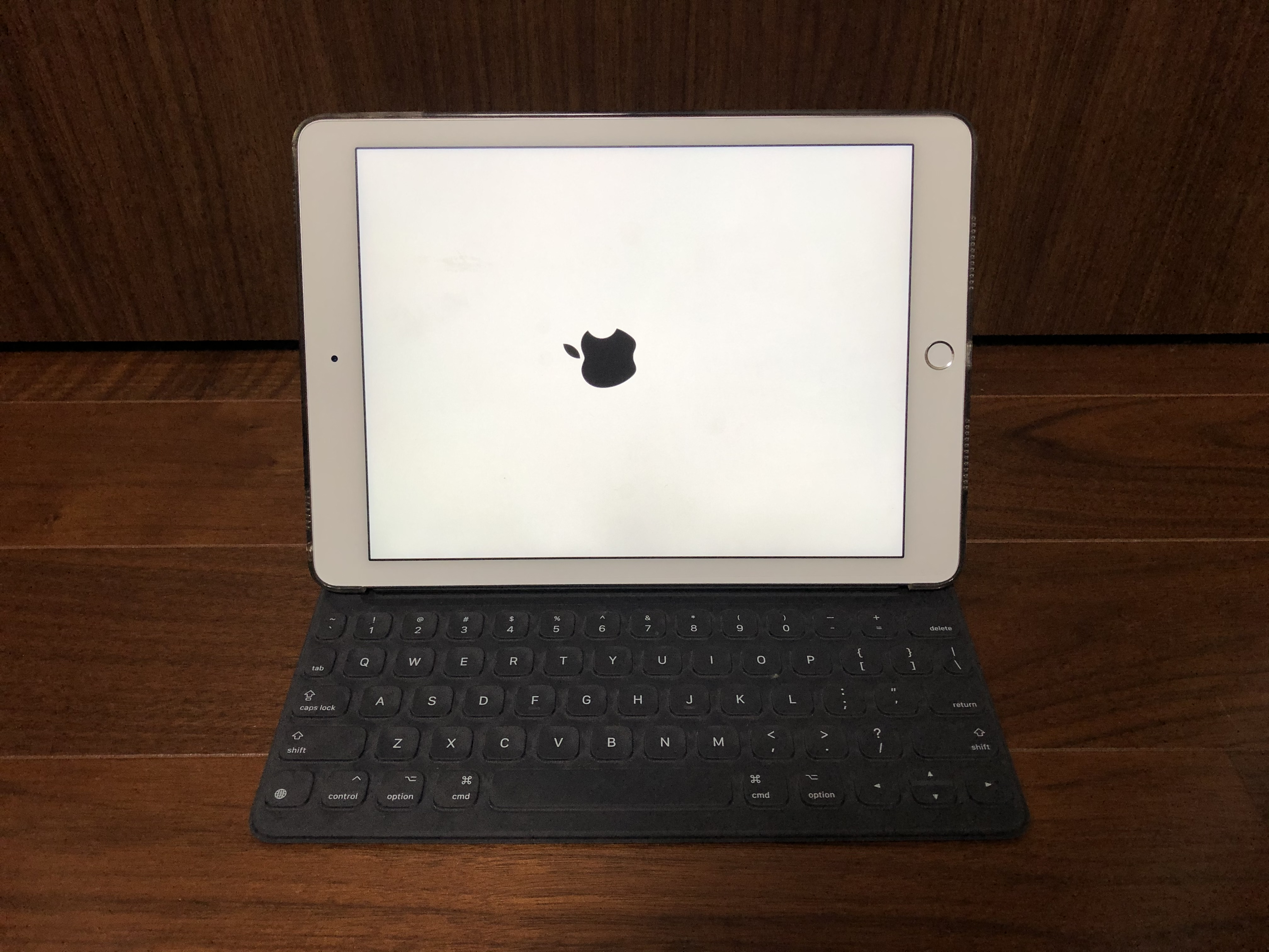 Smart Keyboardを装着した9.7インチiPad Pro